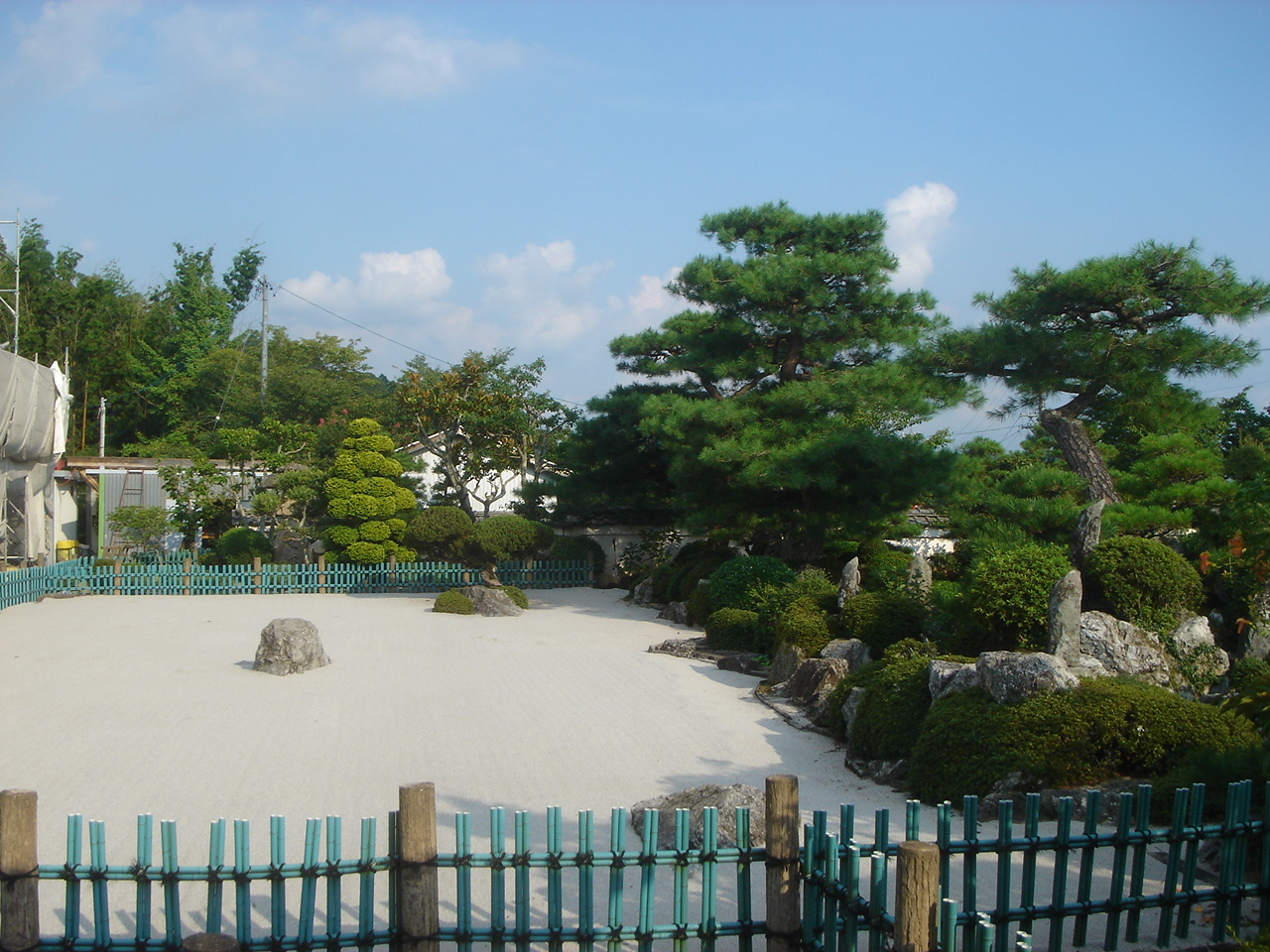 Gukeiji(Temple)(愚渓寺),Mitake,Gifu,Japan(岐阜県御嵩町)で撮影。